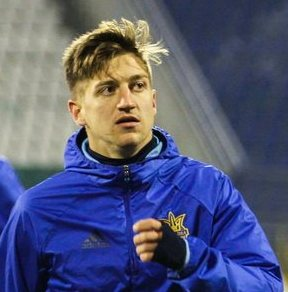 Юрій Вакулко - український футболіст